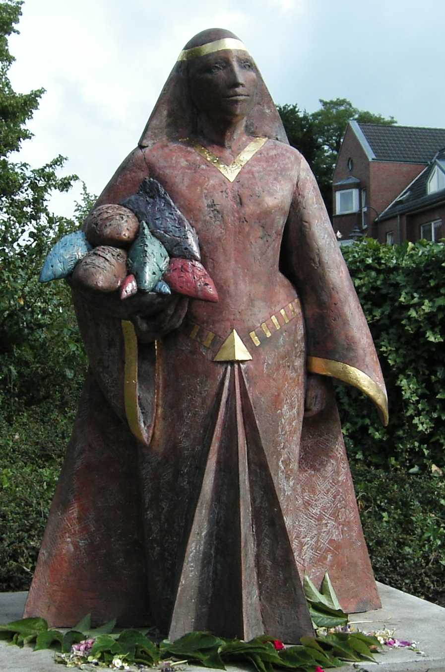 Christa Baumgärtel: Gräfin-Emma-Denkmal am Lesumer Marktplatz in Bremen-Burglesum